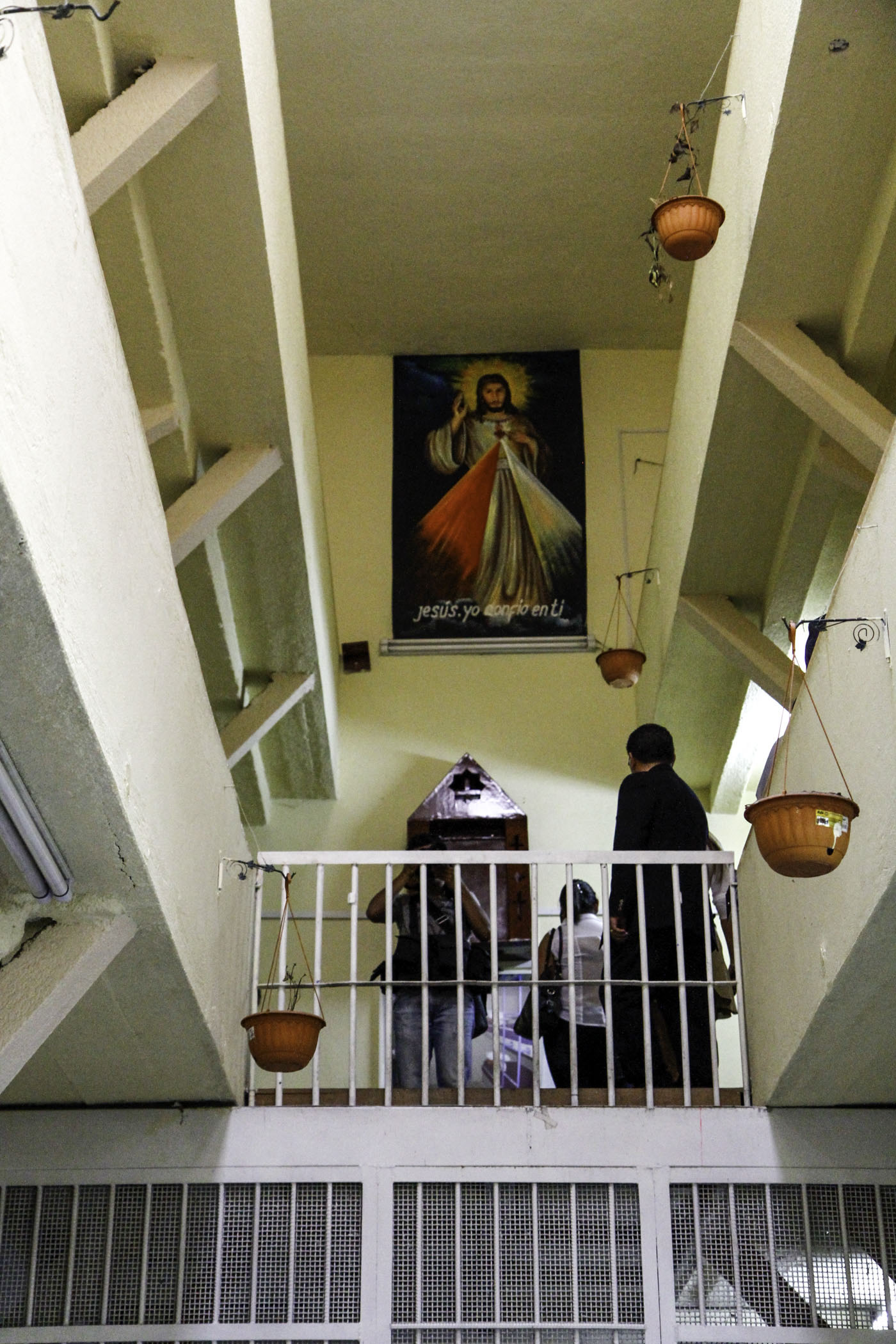 Quito, Ecuador, 20 dic (ANDES).- El Ministerio de Justicia, Derechos Humanos y Cultos presentó la exposición fotográfica "Espacios Verdes" cuyo escenario es el ex-Penal García Moreno. Esta exposición devela lo que dejaron las personas privadas de la libertad antes del cierre de este recinto carcelario. Foto: Micaela Ayala V./ANDES